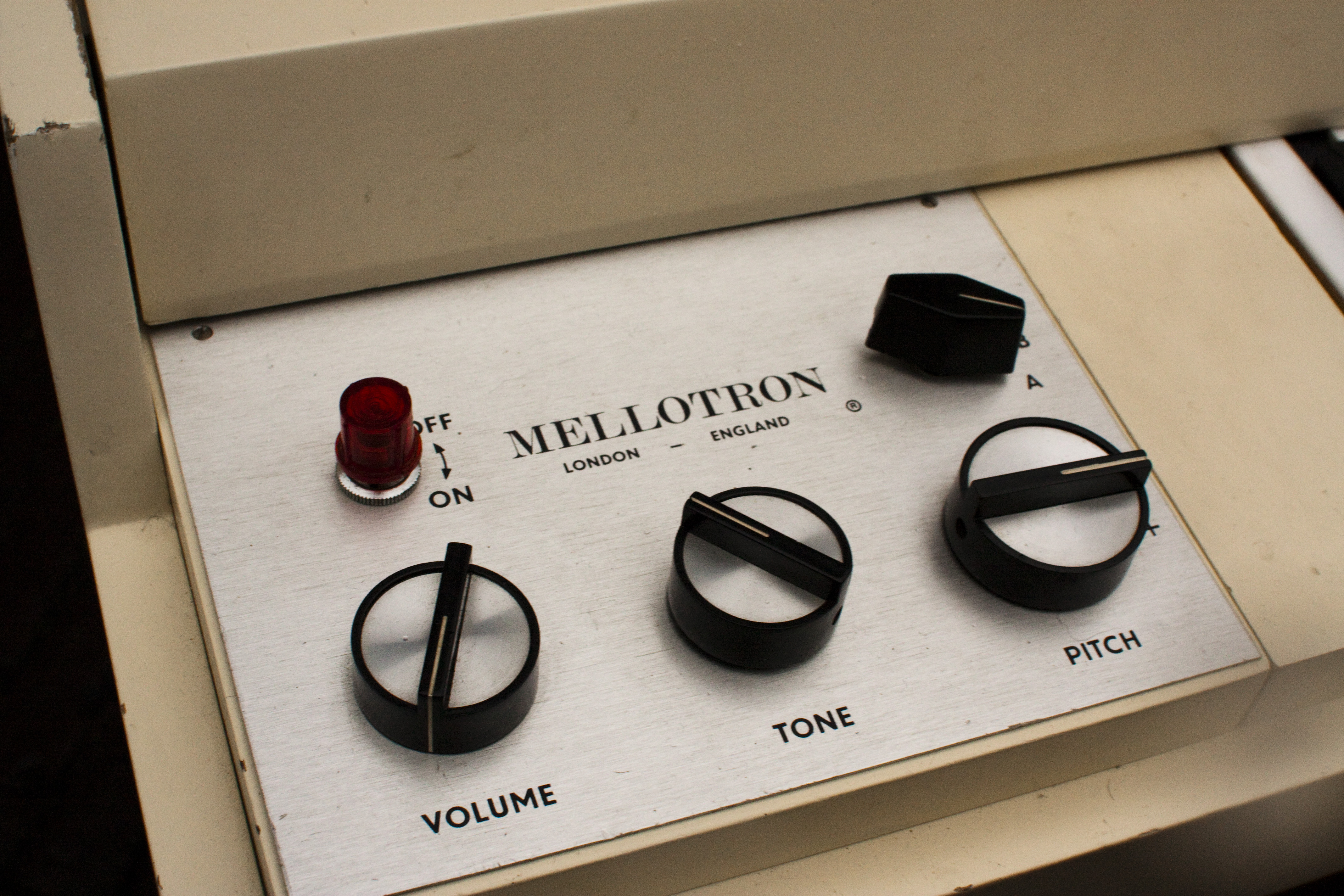 Mellotron (panel)